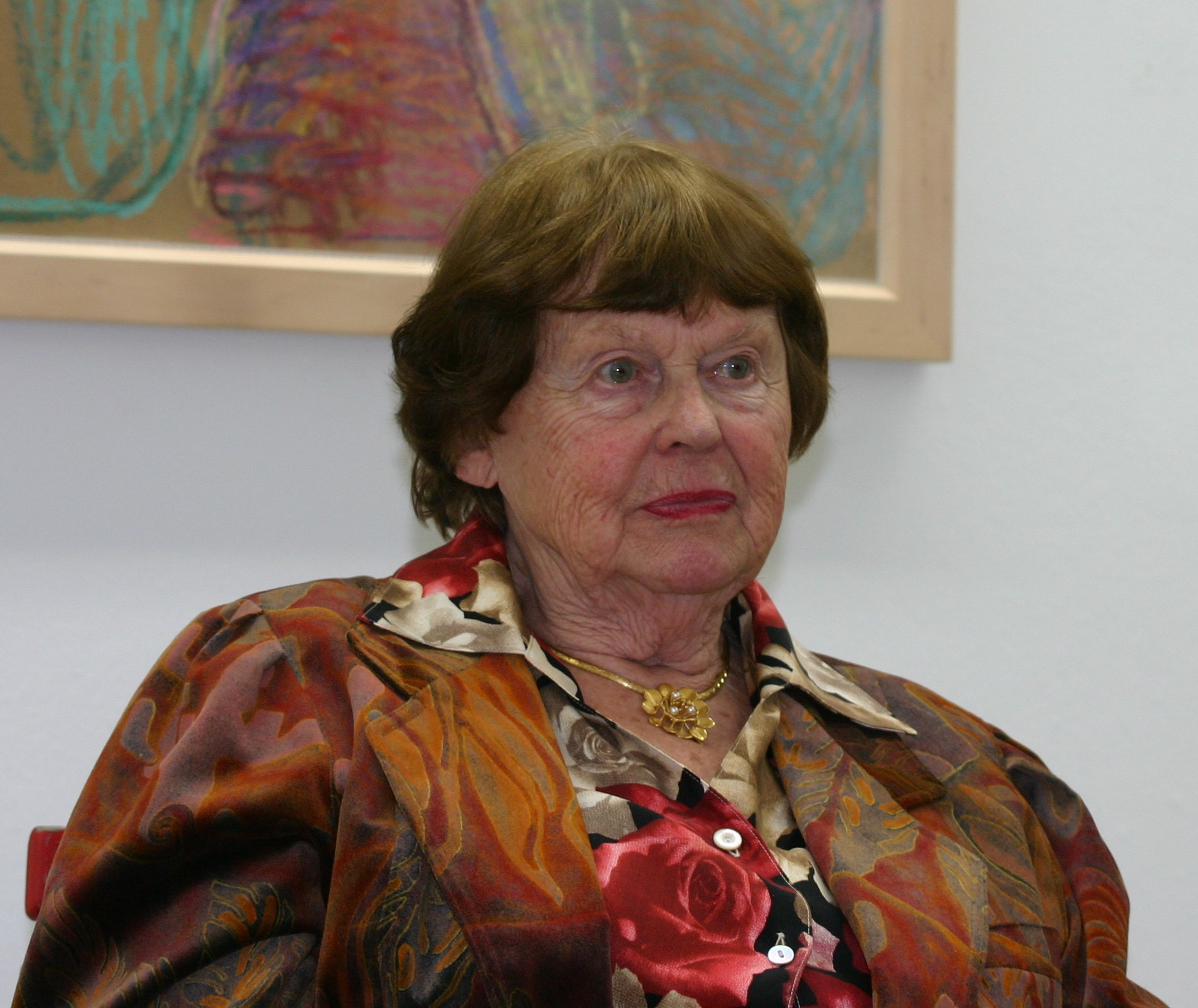 Die Malerin Ingeborg Leuthold (* 1925) während einer Ausstellungseröffnung in der Berliner Ladengalerie.